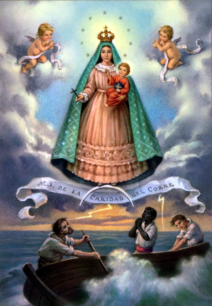 Nuestra Señora de Caridad del Cobre, Patroness of Cuba